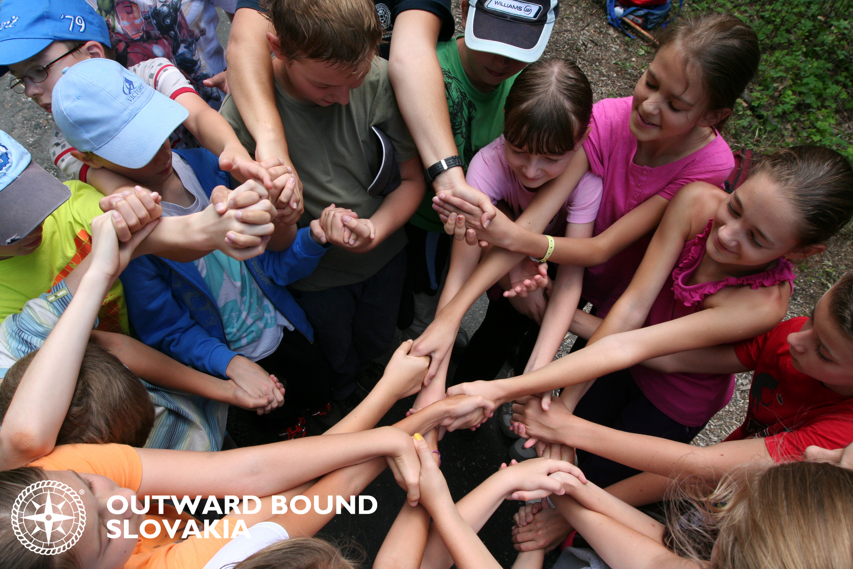 25 žiakov základnej školy na expedičnom pochode Malými Karpatmi